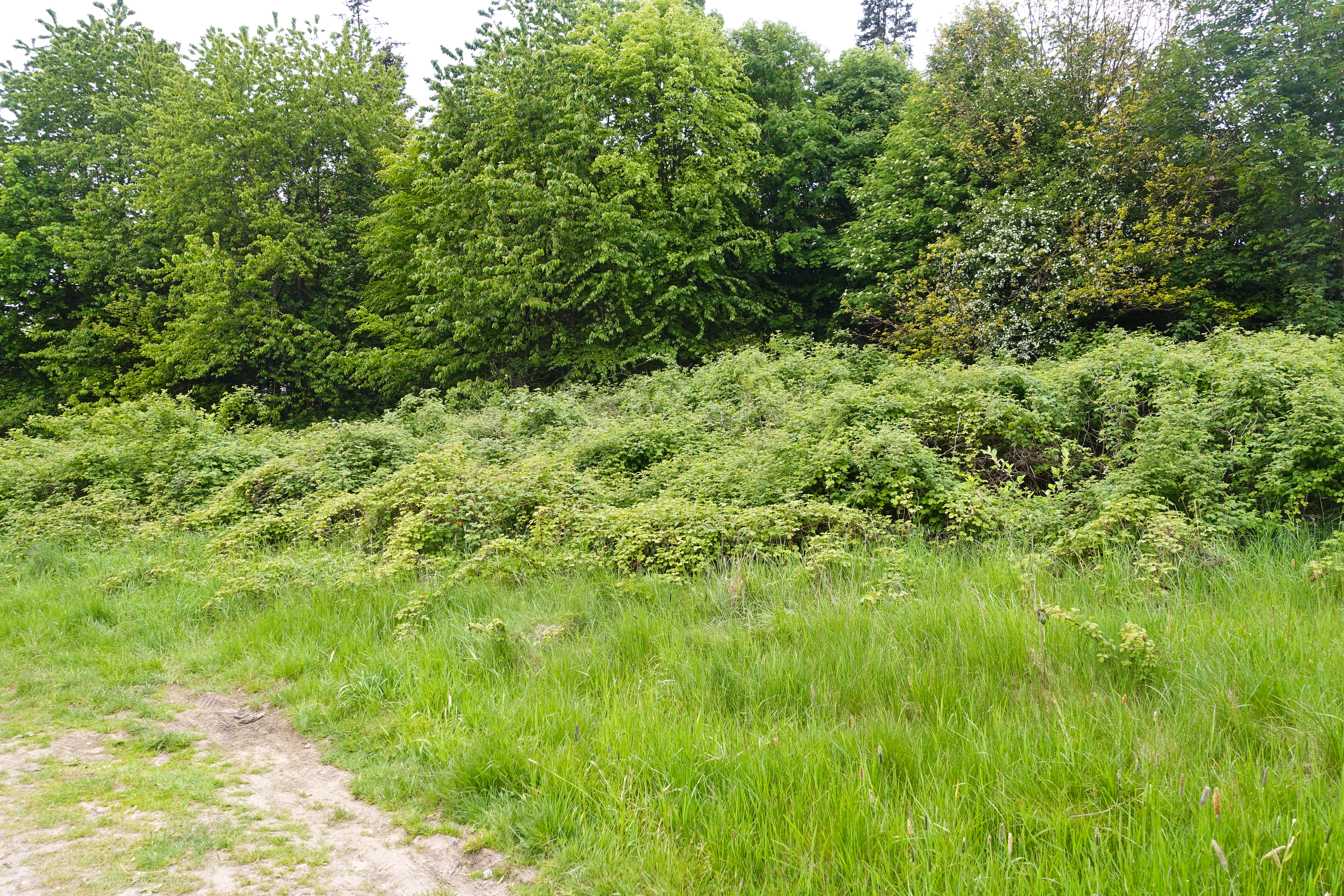 Sukzessionsfläche mit vier sichtbaren Stadien, Bergisches Land, Deutschland